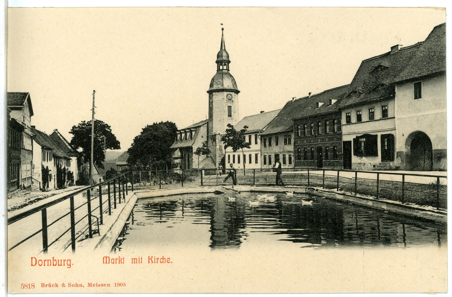 Dornburg; Markt mit Kirche This postcard is from publisher Brück & Sohn in Meißen ( postcard has a unique number 05818 and is available in a higher resolution at the publisher. This images was uploaded in a cooperation project between Wikipedians and the publisher.